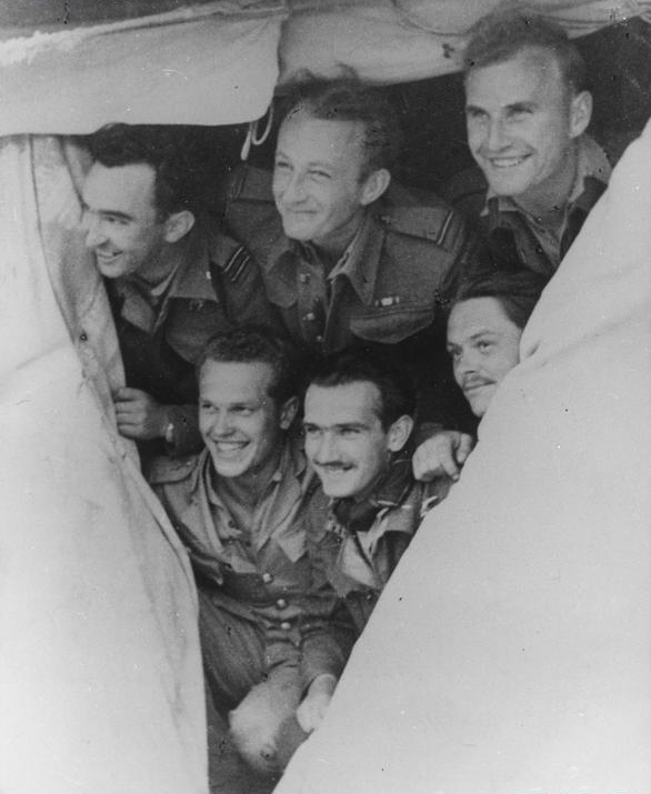 Polski Zespół Myśliwski w Afryce Północnej. U góry od lewej: kpt. Wacław Król, por. Bohdan Arct, st. sierż. Władysław Majchrzyk. U dołu od lewej: chor. Mieczysław Popek, por. Ludwik Martel, por. Władysław Drecki.